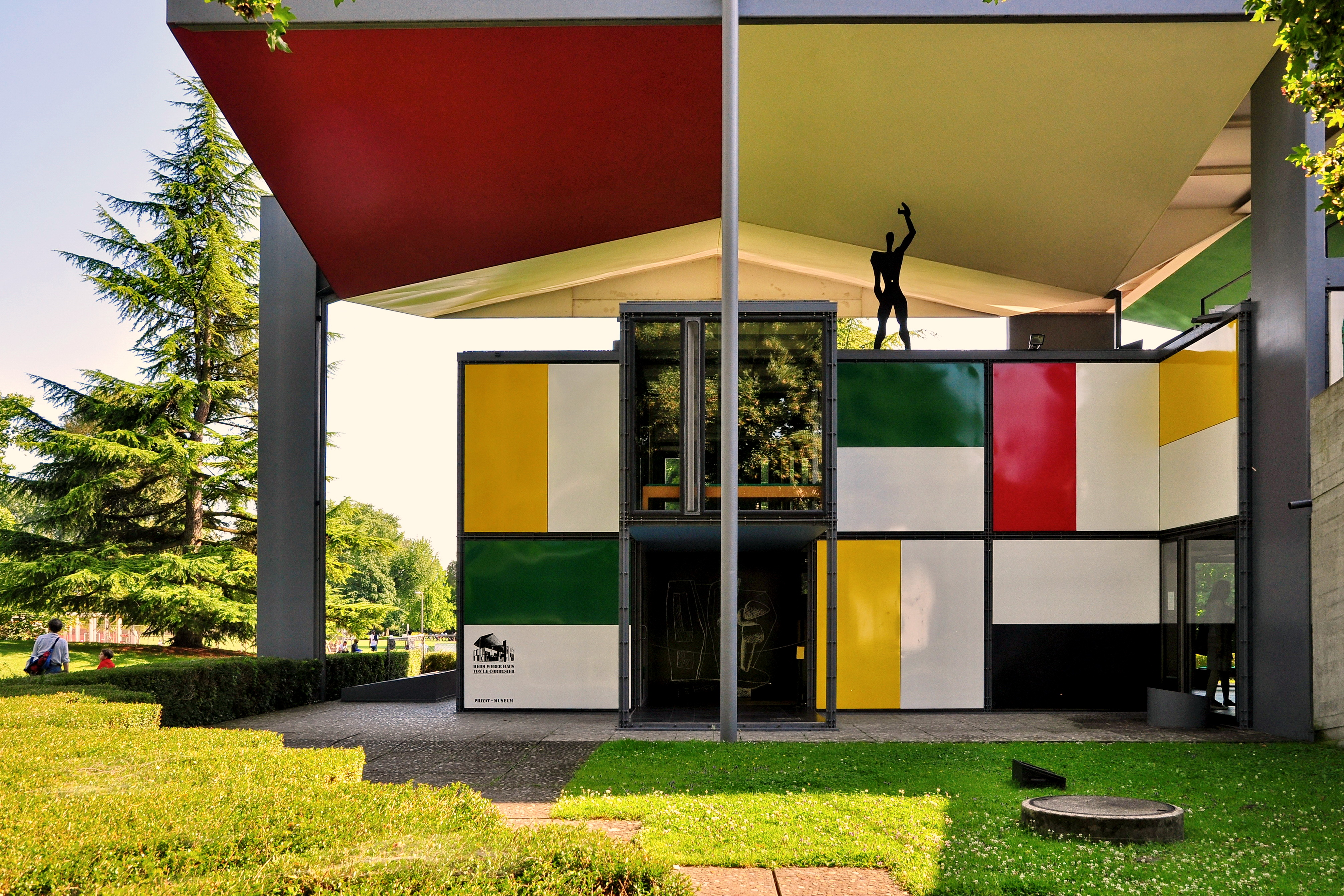 Centre Le Corbusier (Heidi Weber Museum) in Zürich-Seefeld (Switzerland)